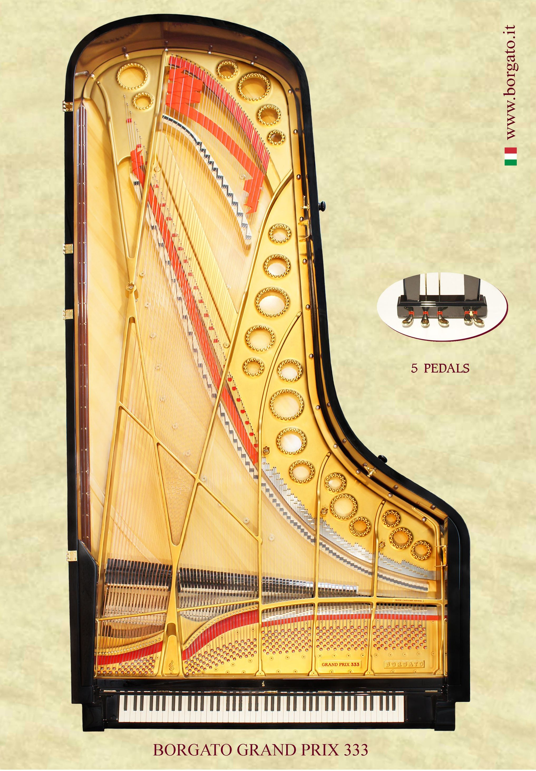 CONCERT GRAND PIANO BORGATO GRAND PRIX 333